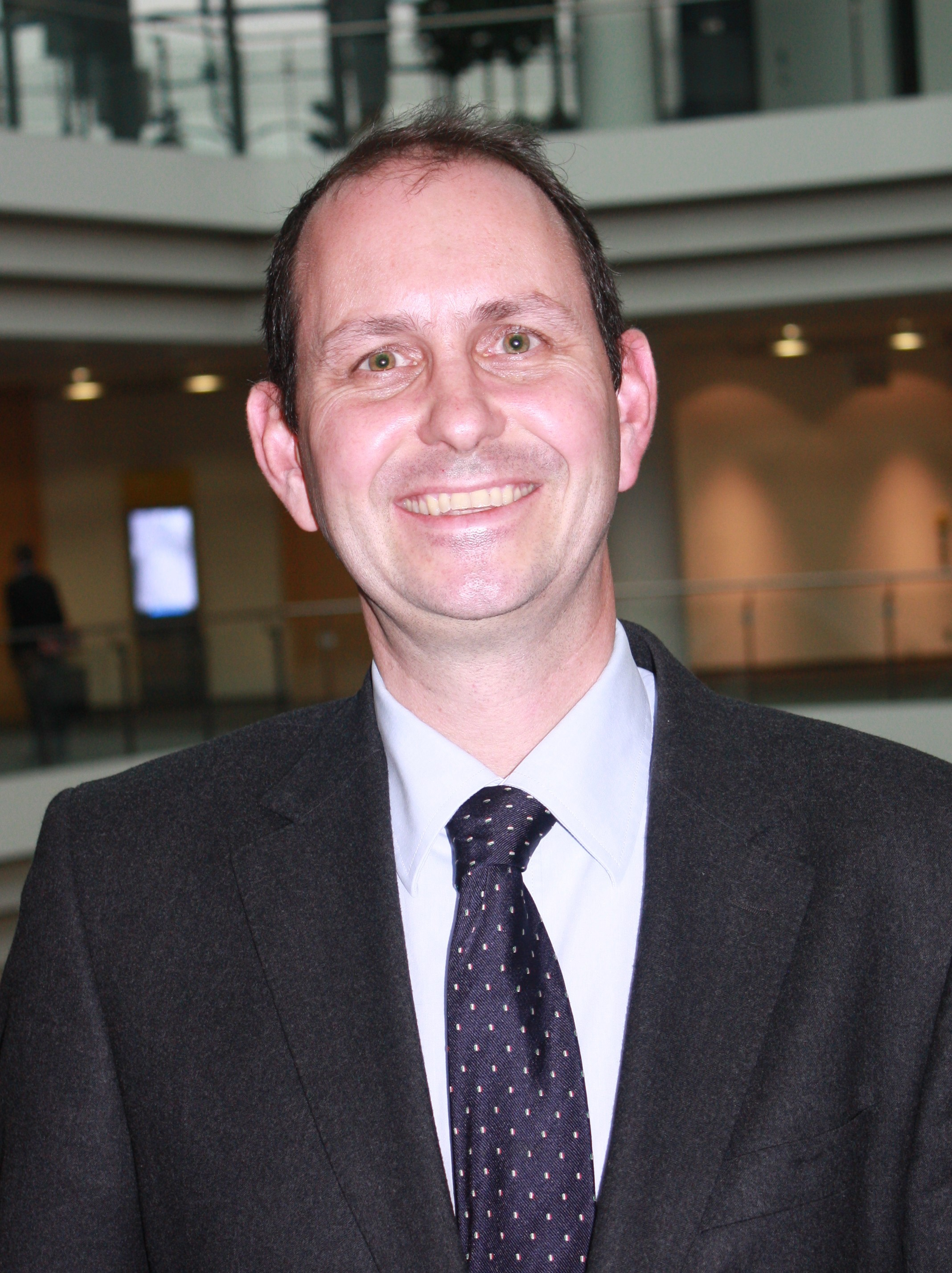 Christoph Israng, Ständiger Vertreter der Bundesrepublik Deutschland bei der OVCW in Den Haag.